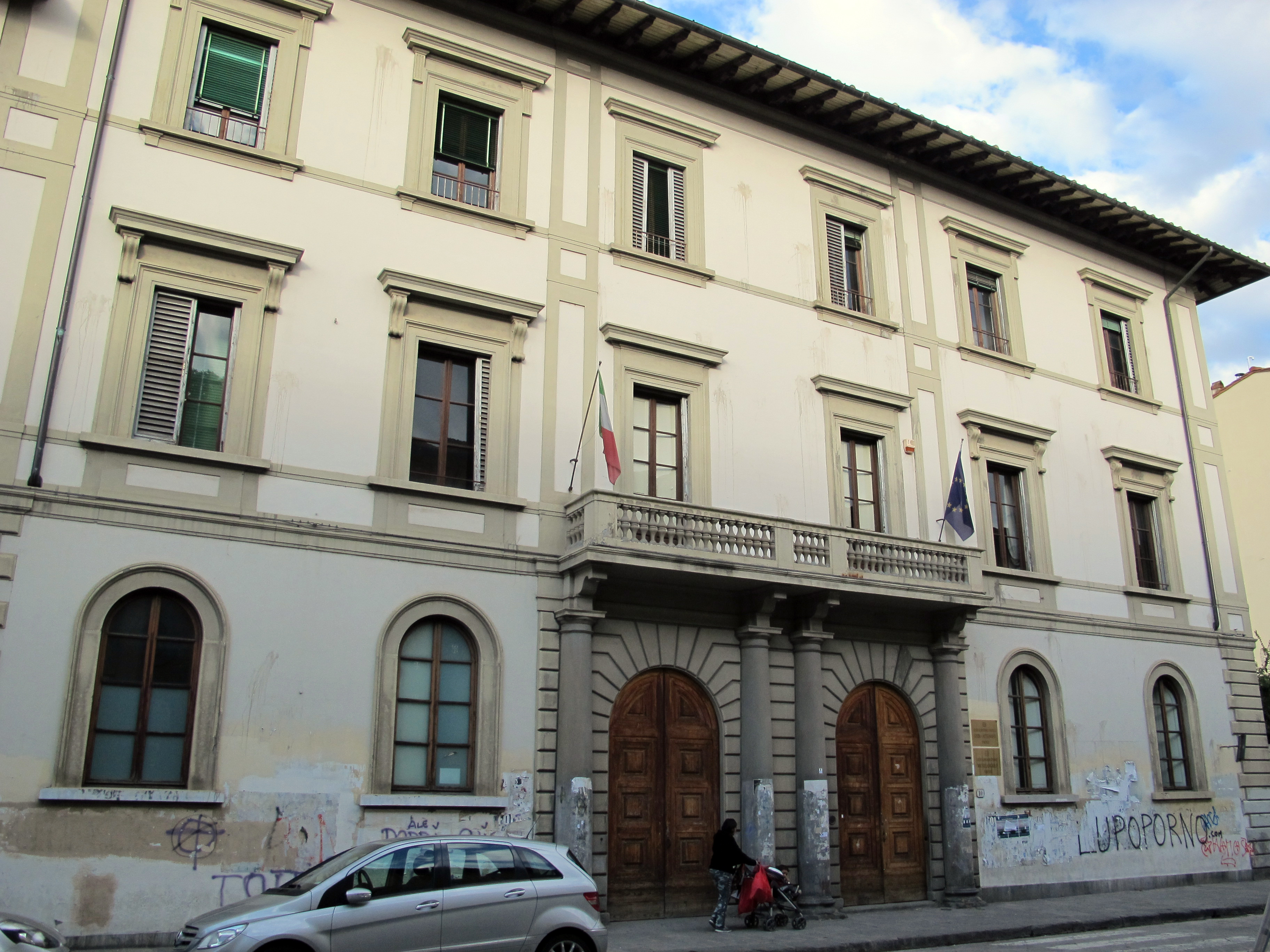 Firenze